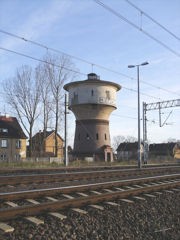 Kolejowa wieża ciśnień w Miłkowicach.